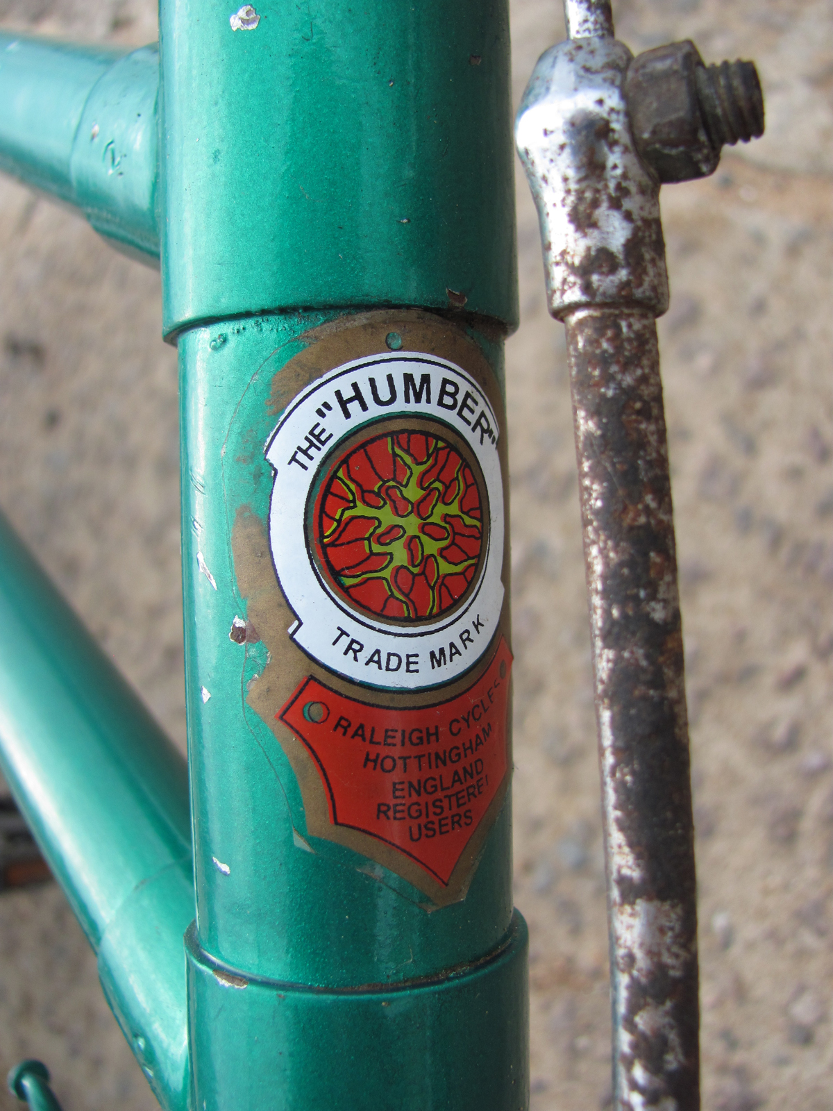 Humber-Raleigh Headtube